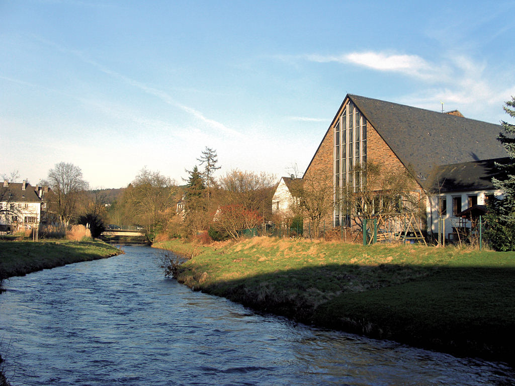 St. Servatius in Rösrath-Hoffnungsthal (Sülzseite)